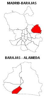 Croquis de Barajas y de la Alameda de Osuna